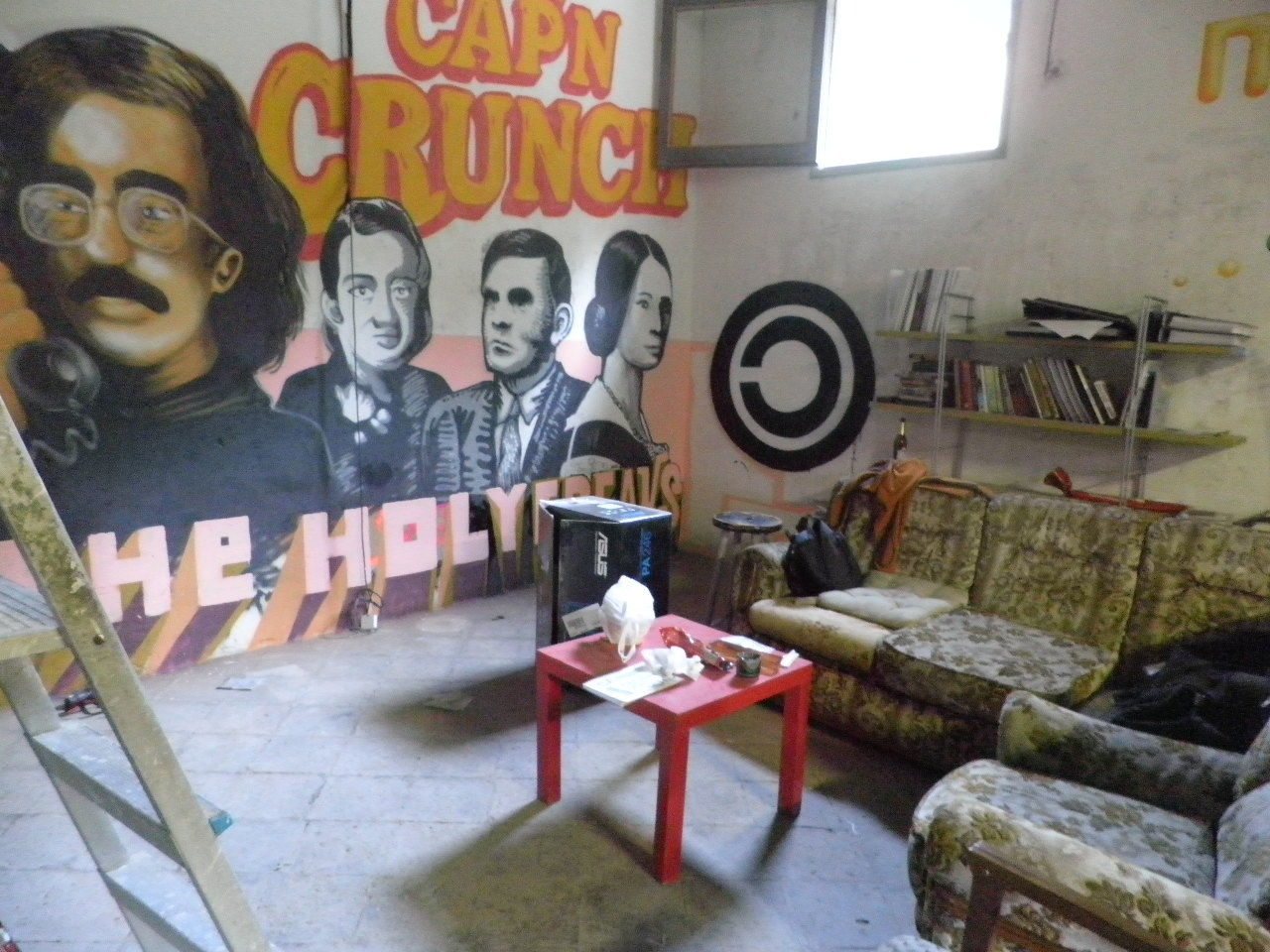 HackLab de Ca la Fou, Colònia Industrial Postcapitalista, a Vallbona d'Anoia. Octubre 2012. El grafitti a la paret es basa en un disseny aprovat en assemblea.